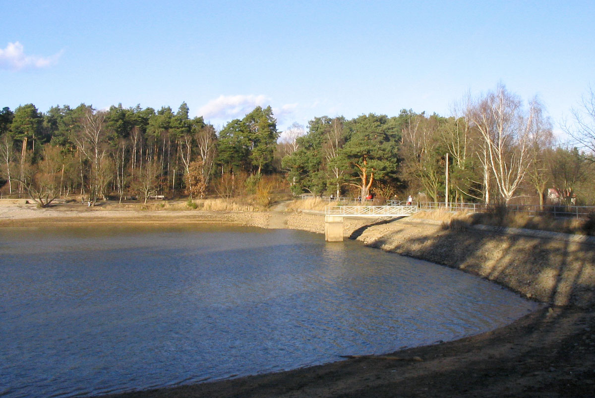 Severní břeh a hráz vypuštěného Šídlovského rybníku na severním okraji Plzně.